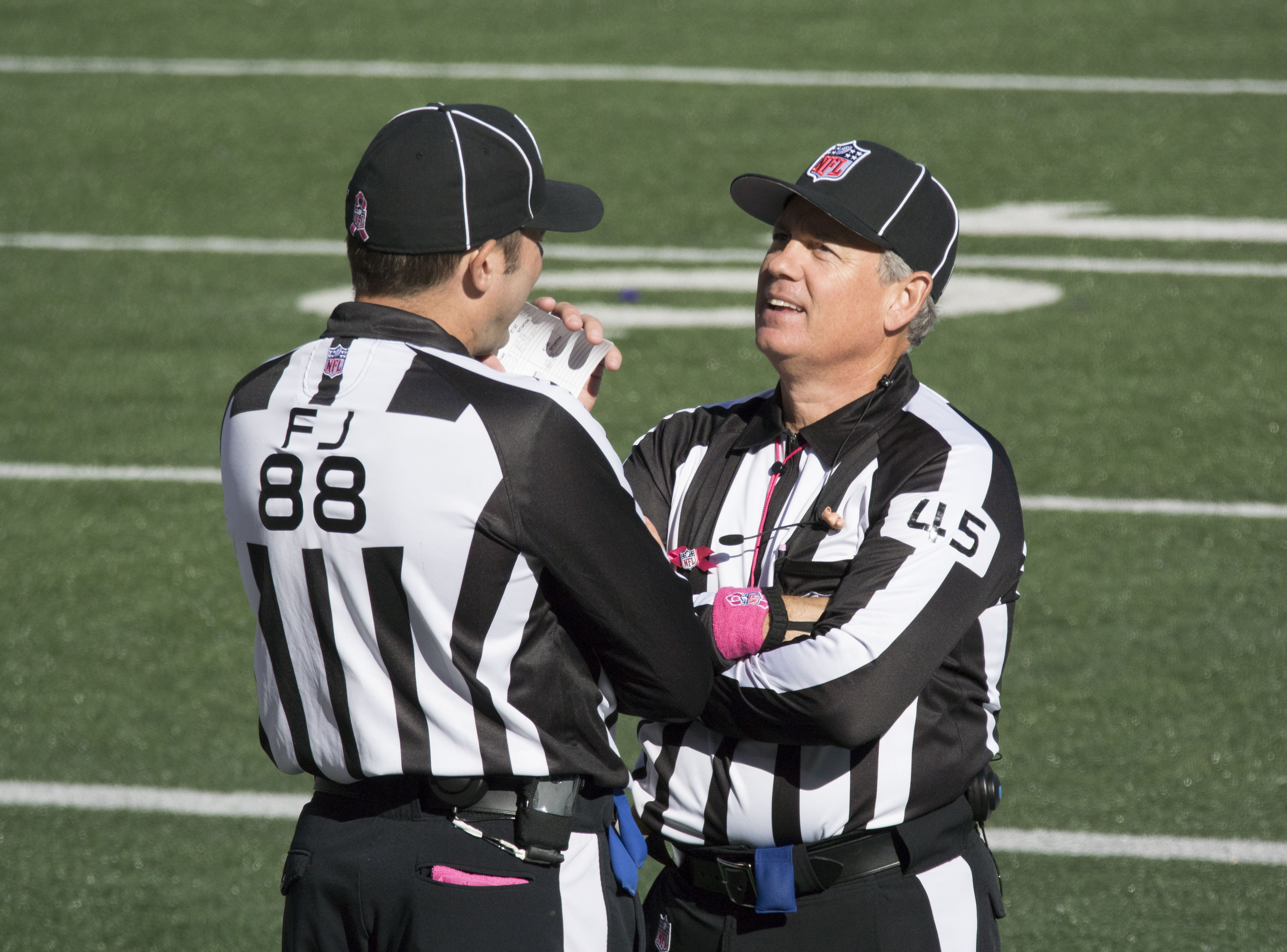 Falcons at Ravens 10/19/14